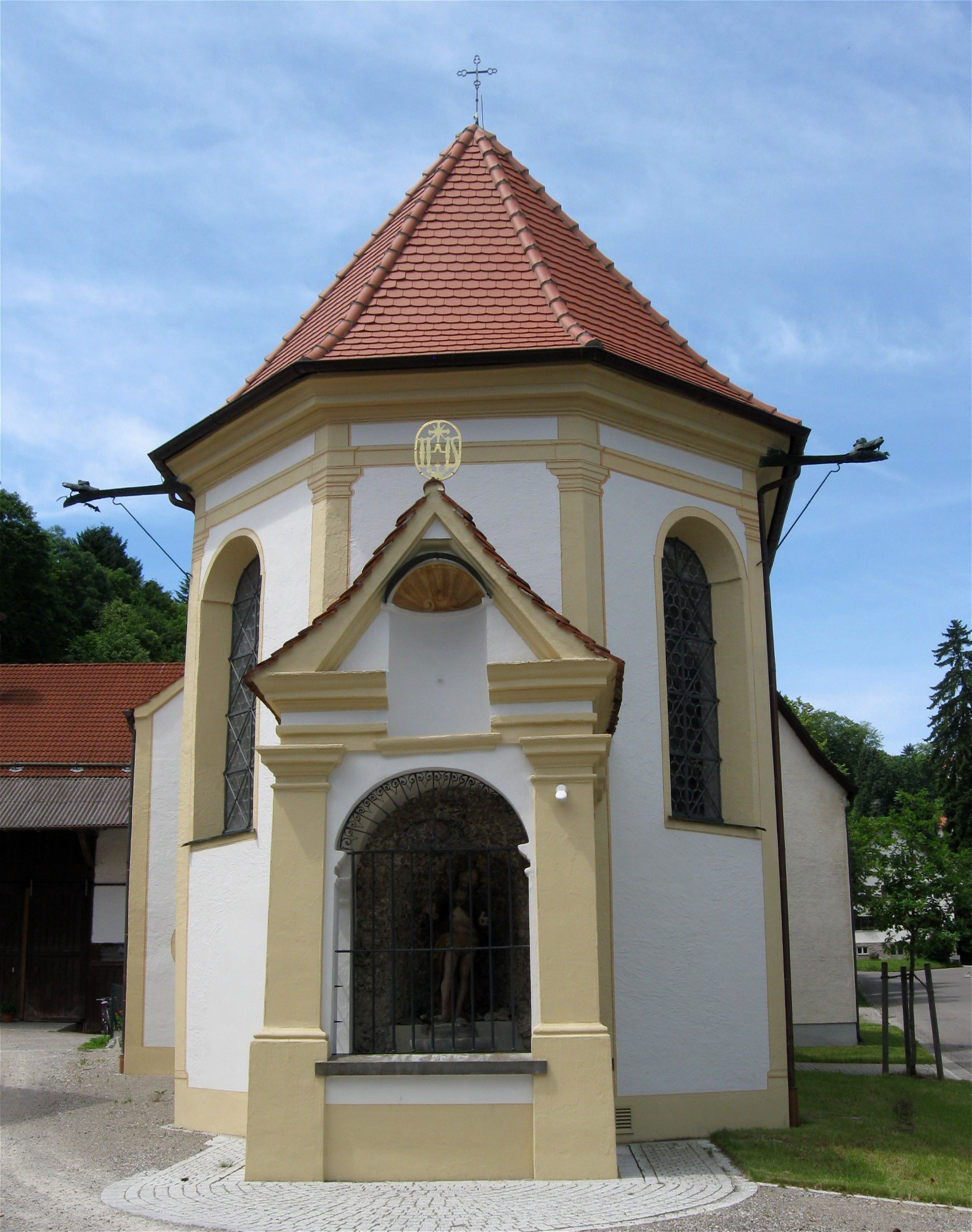 Memminger Straße 9; Katholische Liebfrauenkapelle, Kapelle des ehem. Leprosenhauses, Saalbau mit dreiseitigem Schluss, Dachreiter mit Haubendach und östlicher Brunnenkapelle, im Kern um 1455, Umgestaltung Mitte 17. Jahrhundert und 1725; mit Ausstattung; Verbindungsbau zum Leprosenhaus, zweigeschossiger Satteldachbau mit Oratorium und Franziskusgrotte, 17. Jahrhundert. D-7-78-173-112